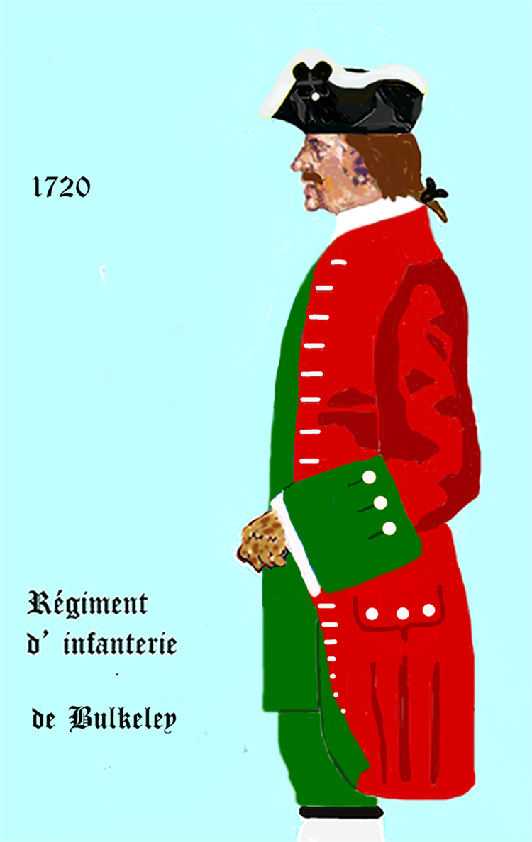 Uniform eines königlich französischen Infanterie-Regiments von 1720. - Entnommen und überarbeitet aus: „LES UNIFORMES ET LES DRAPEAUX DE L'ARMÉE DU ROI“ Marseille 1899.